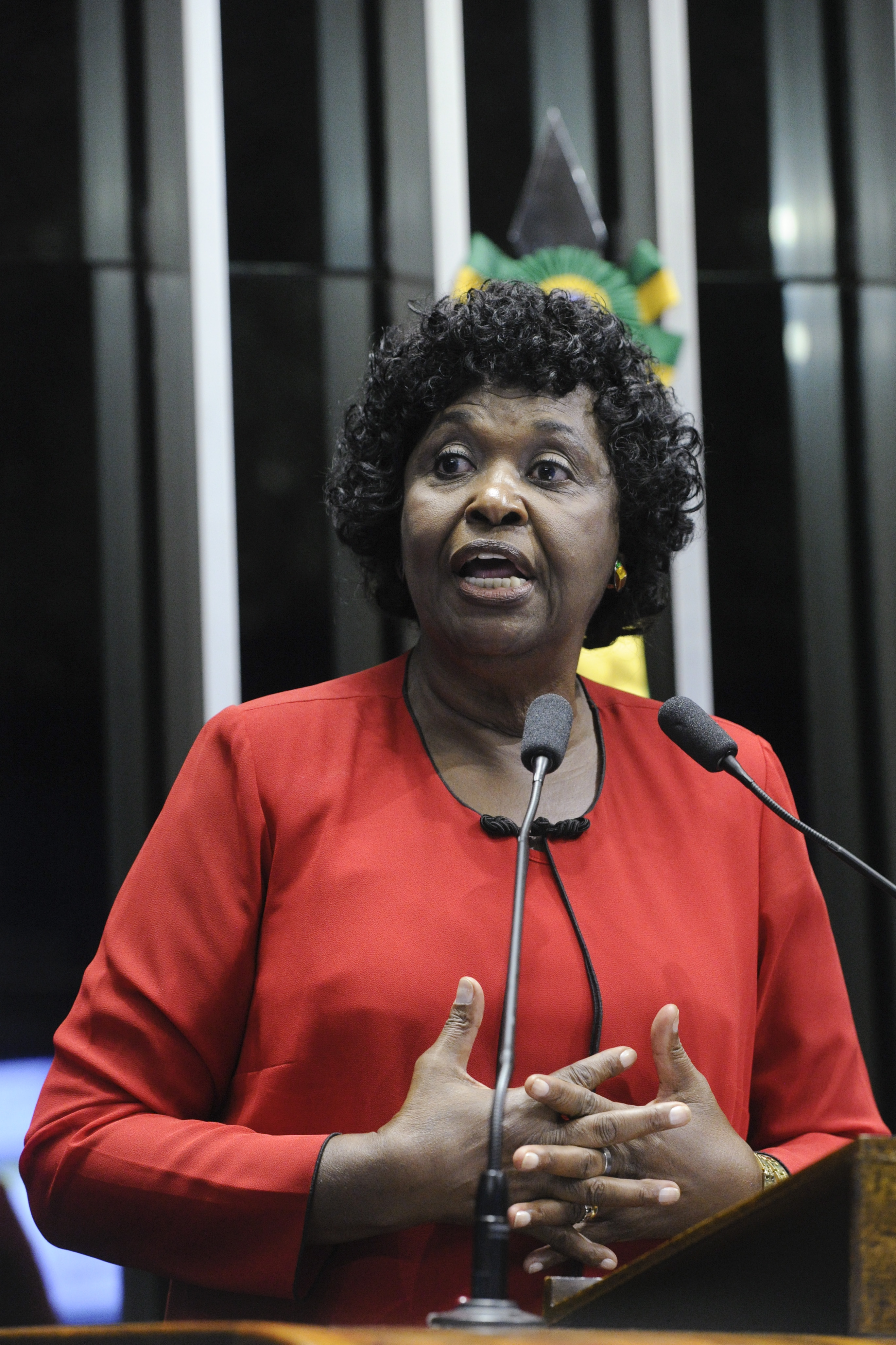 Plenário do Senado durante sessão solene do Congresso Nacional destinada à comemoração do Dia Internacional da Mulher e à entrega do Diploma Bertha Lutz em sua 17ª Premiação. O Diploma Bertha Lutz premia anualmente mulheres e homens que tenham oferecido contribuição relevante à defesa dos direitos da mulher e questões do gênero no Brasil, em qualquer área de atuação. Em discurso, à tribuna, deputada Benedita da Silva (PT-RJ). Foto: Geraldo Magela/Agência Senado